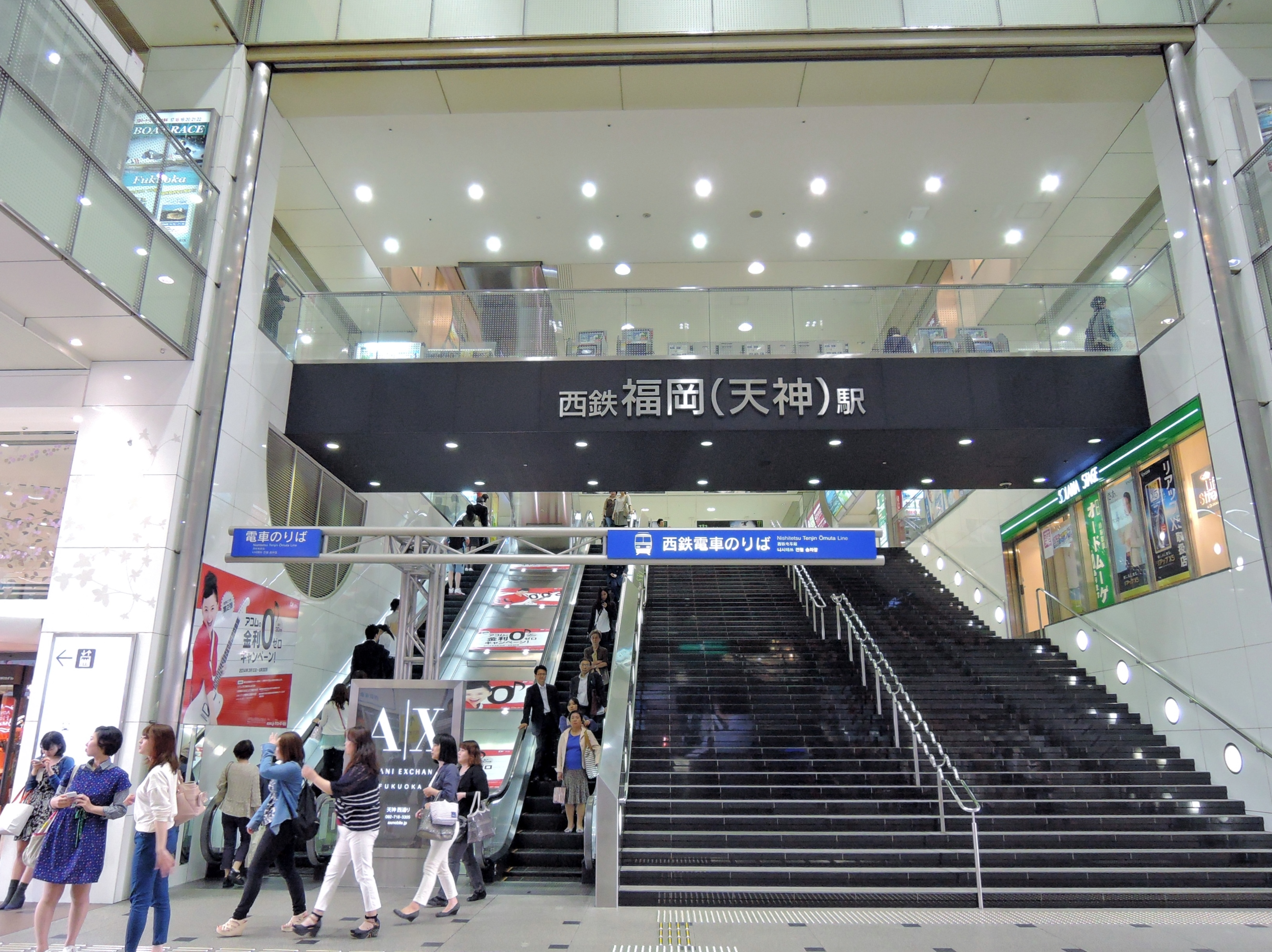 ソラリアステージ側からの入口